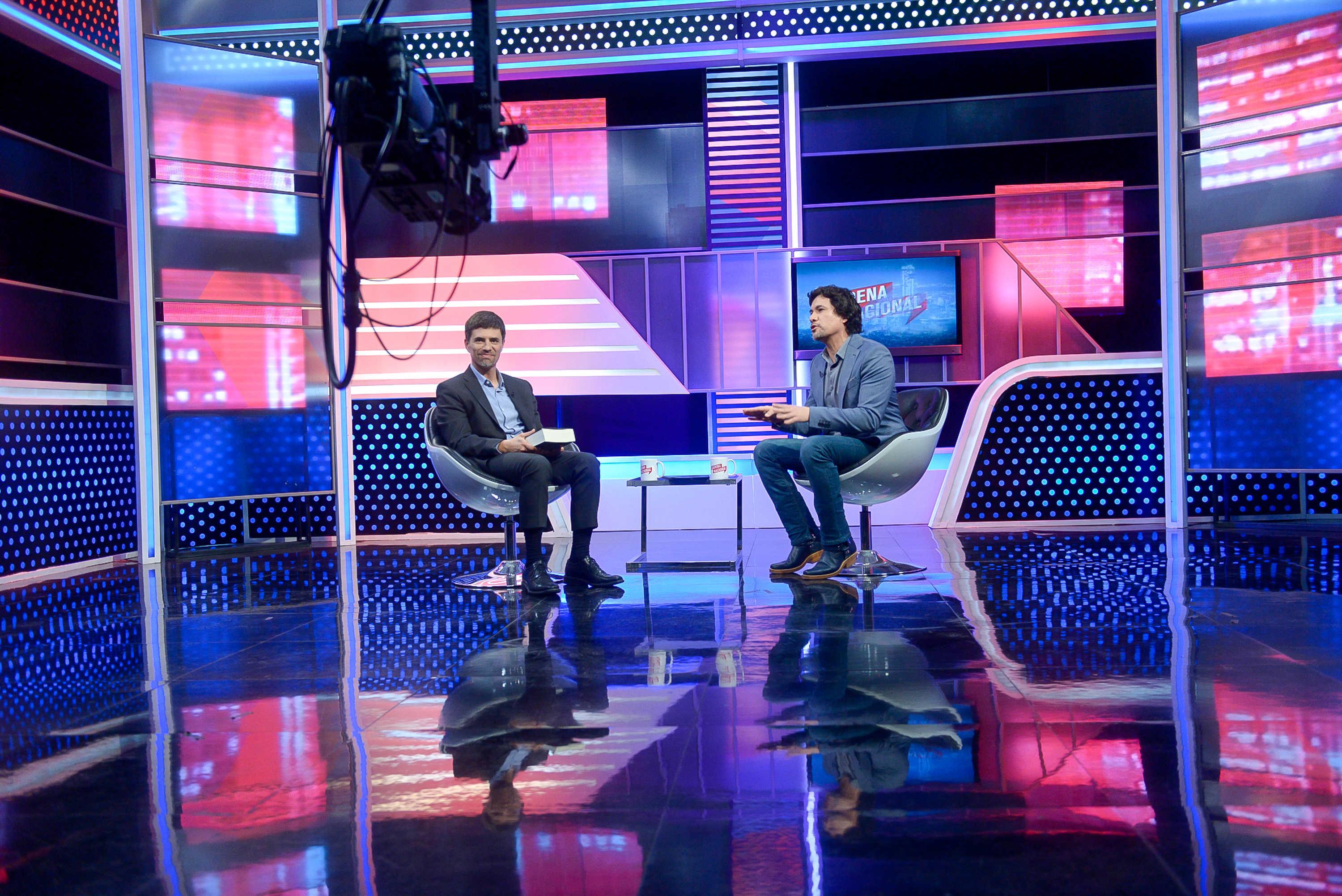 Ministro Marcelo Díaz participa en el programa de Via X Cadena Nacional